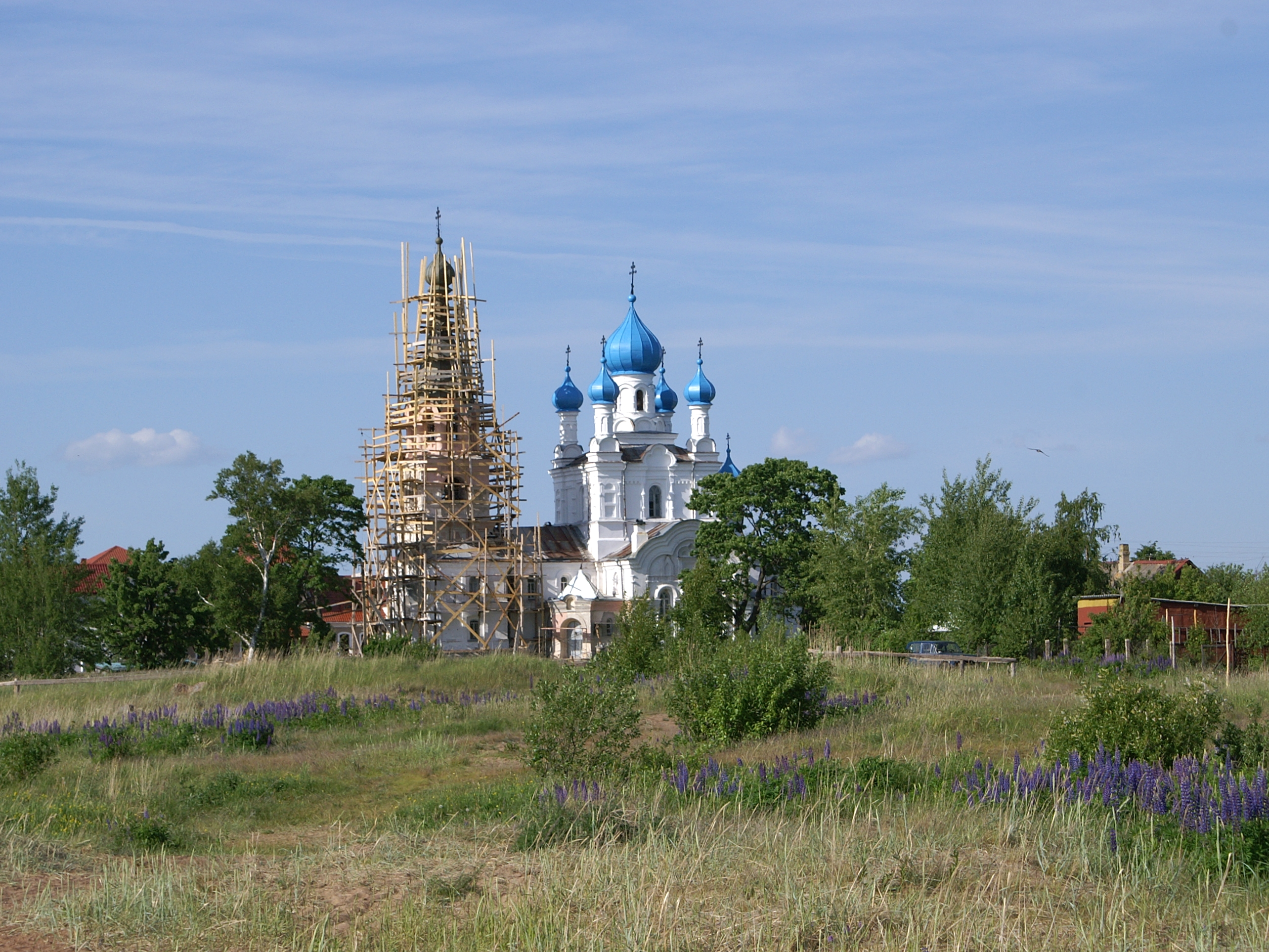 Петропавловская церковь в Ветвенике, Псковская обл. Peter and Paul Church (Russian Orthodox), Pskov oblast, Russia